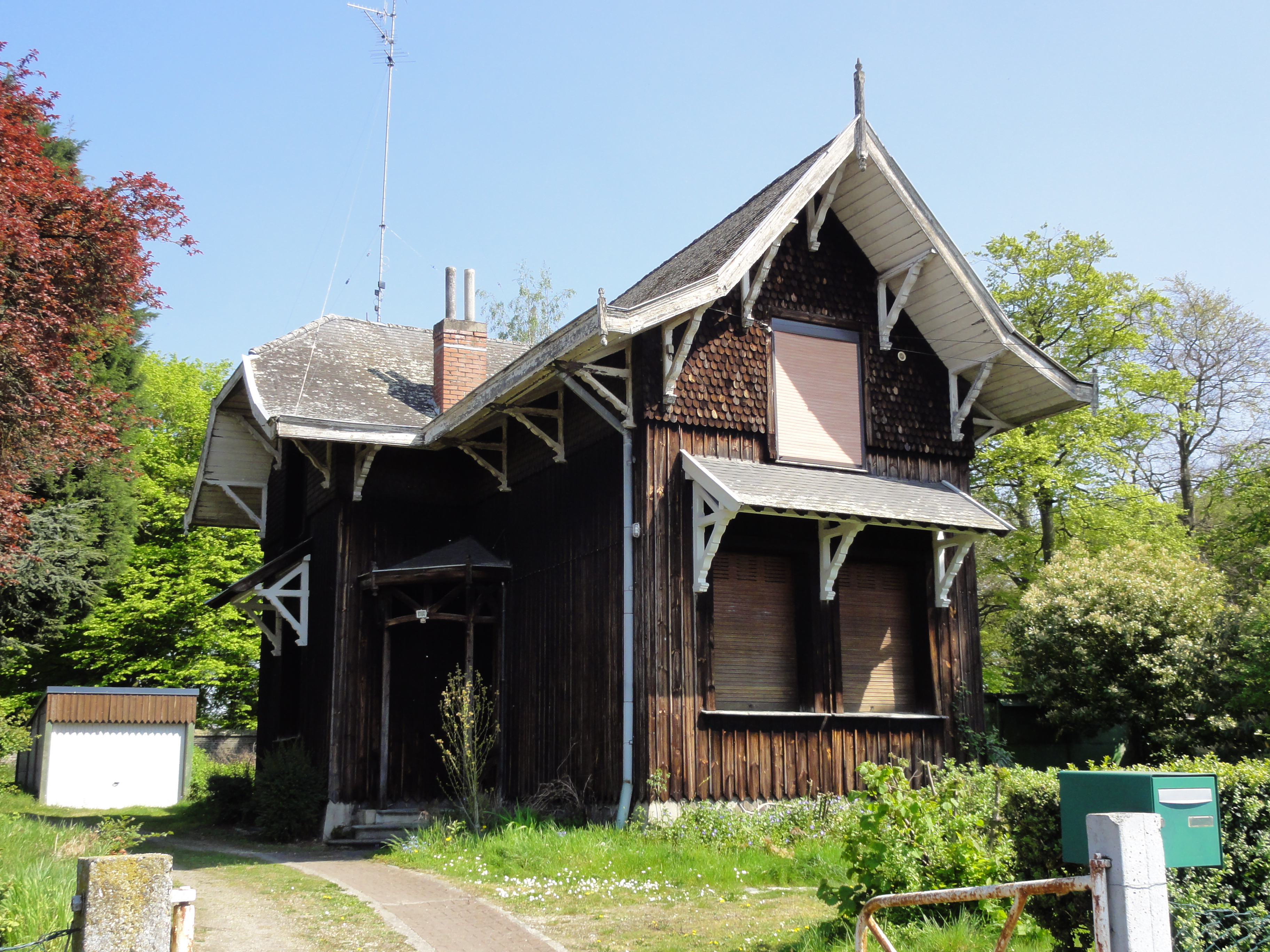 Église Sainte-Cécile et son presbytère des cités de la fosse Sabatier de la Compagnie des mines d'Anzin dans le bassin minier du Nord-Pas-de-Calais, cité du Pinson Ancienne, Raismes, Nord, Nord-Pas-de-Calais, France. L'église est inscrite aux monuments historiques le 1er décembre 2009 et inscrite sur la liste du patrimoine mondial par l'Unesco le 30 juin 2012 et y constitue en partie le site no 8. .